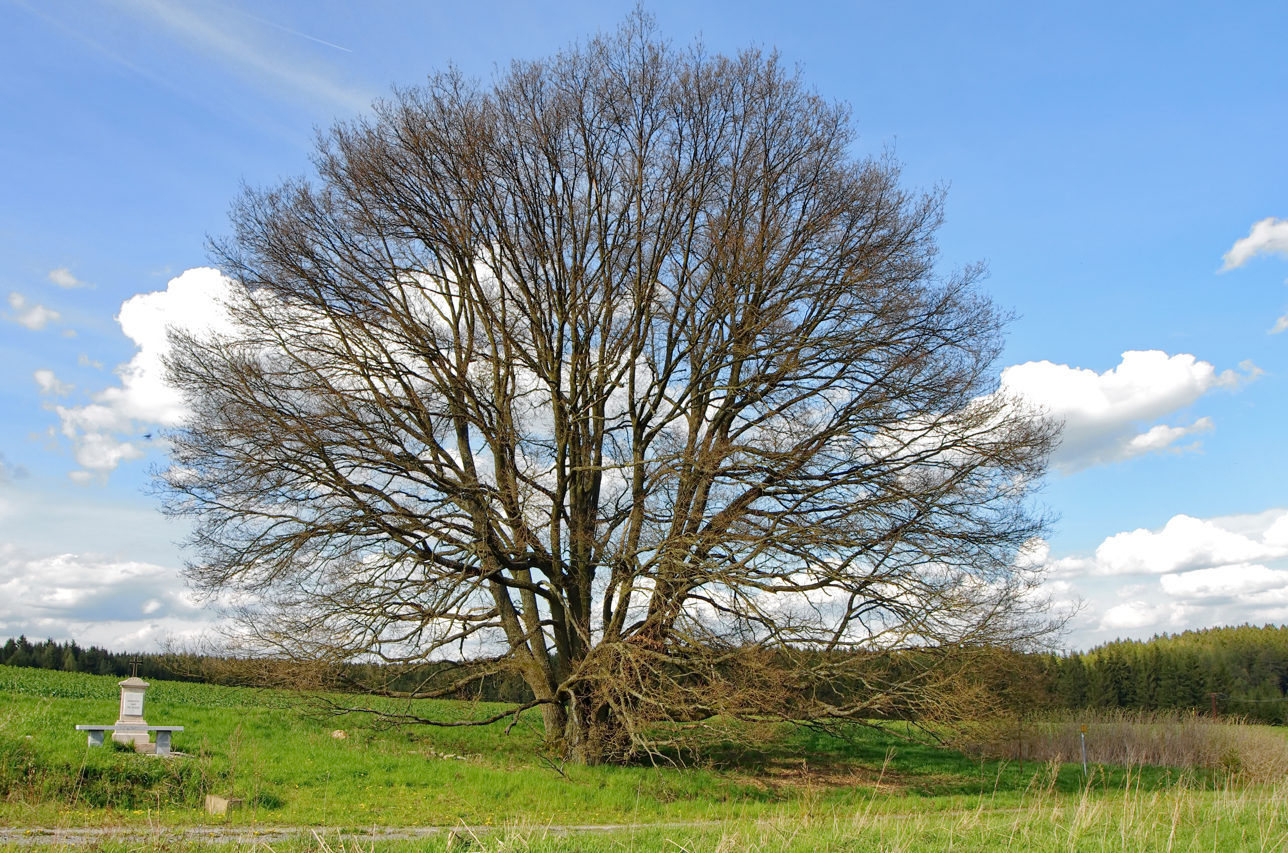 Památný strom, Dub U oříšku, u obce Tři Sekery, okres Cheb